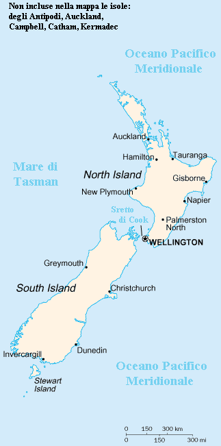 Mappa della Nuova Zelanda. Ripresa da Wiki tedesca, modificata per italianizzare i toponimi. Renato Caniatti Origine mappa: CIA World Factbook, pubblico dominio.